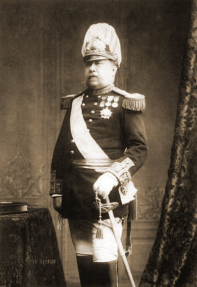 Lodewijk van Portugal